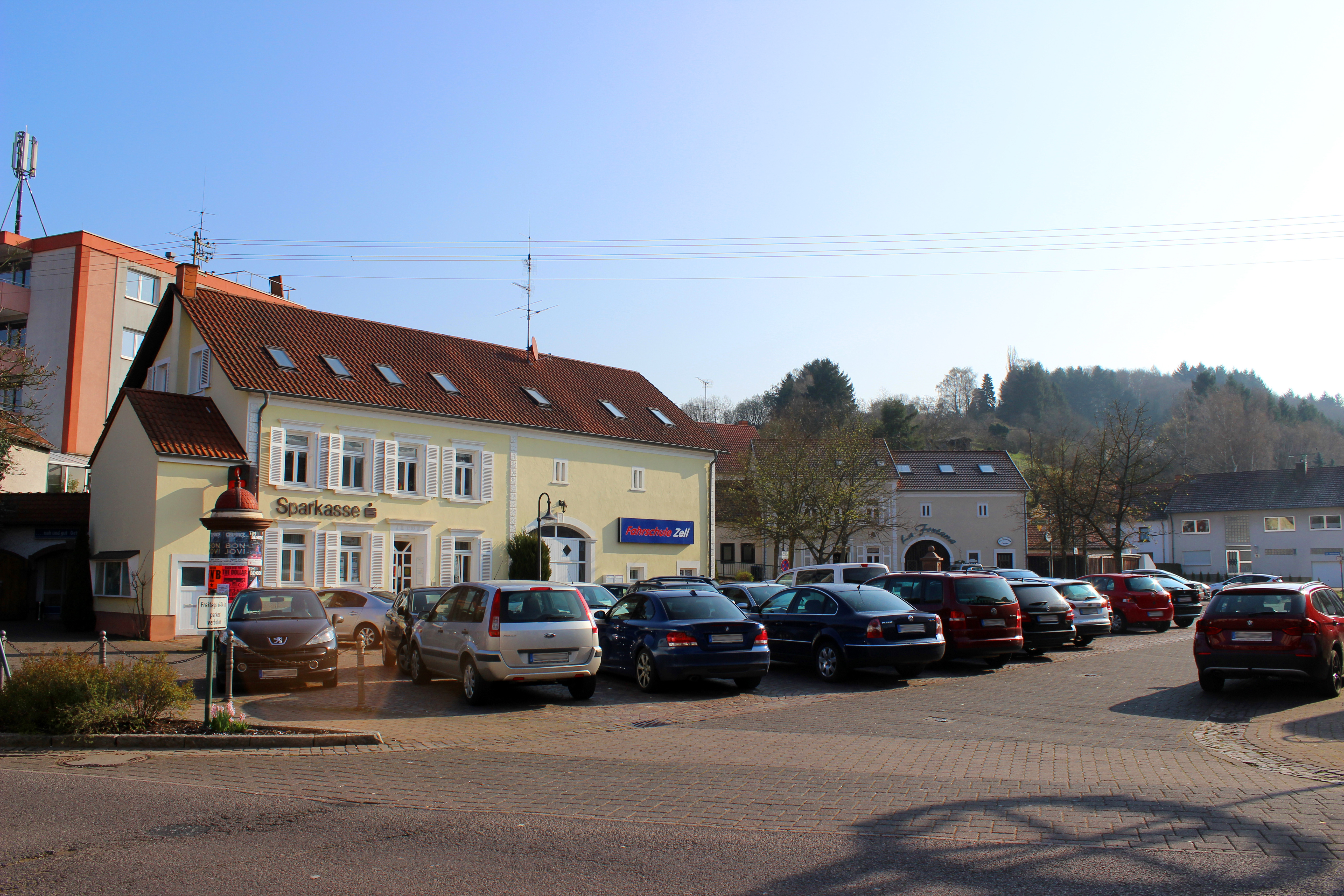 Dorfplatz, Düppenweiler, Gemeinde Beckingen, Landkreis Merzig-Wadern, Saarland